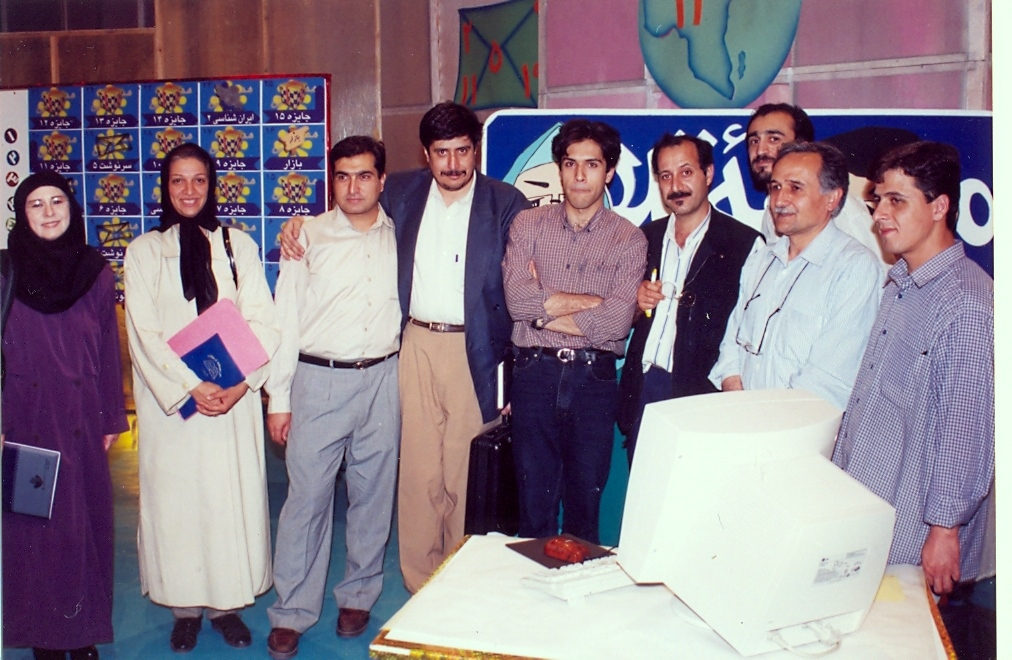 تعدادی از دست‌اندرکاران مسابقه‌ی تلاش